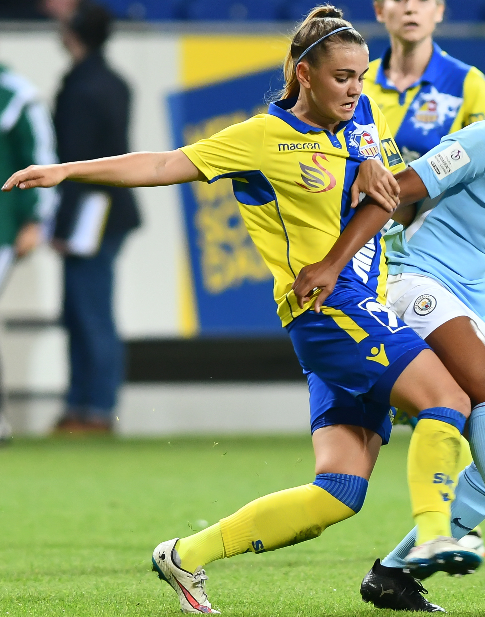 UEFA Women's Champions League 2017/18, Runde der letzten 32, SKN St. Pölten gegen Manchester City W.F.C. am 4.10.2017, Bild zeigt: Demi Stokes (3, MCW), Laura Wienroither (26, SKN)